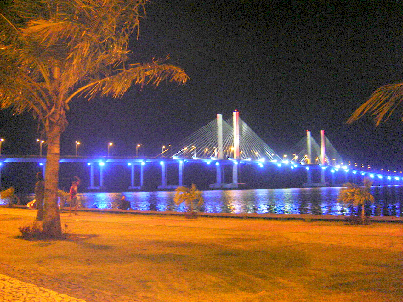 Ponte Aracaju-Barra.jpgAracaju-Barra Bridge in Sergipe state, Brazil